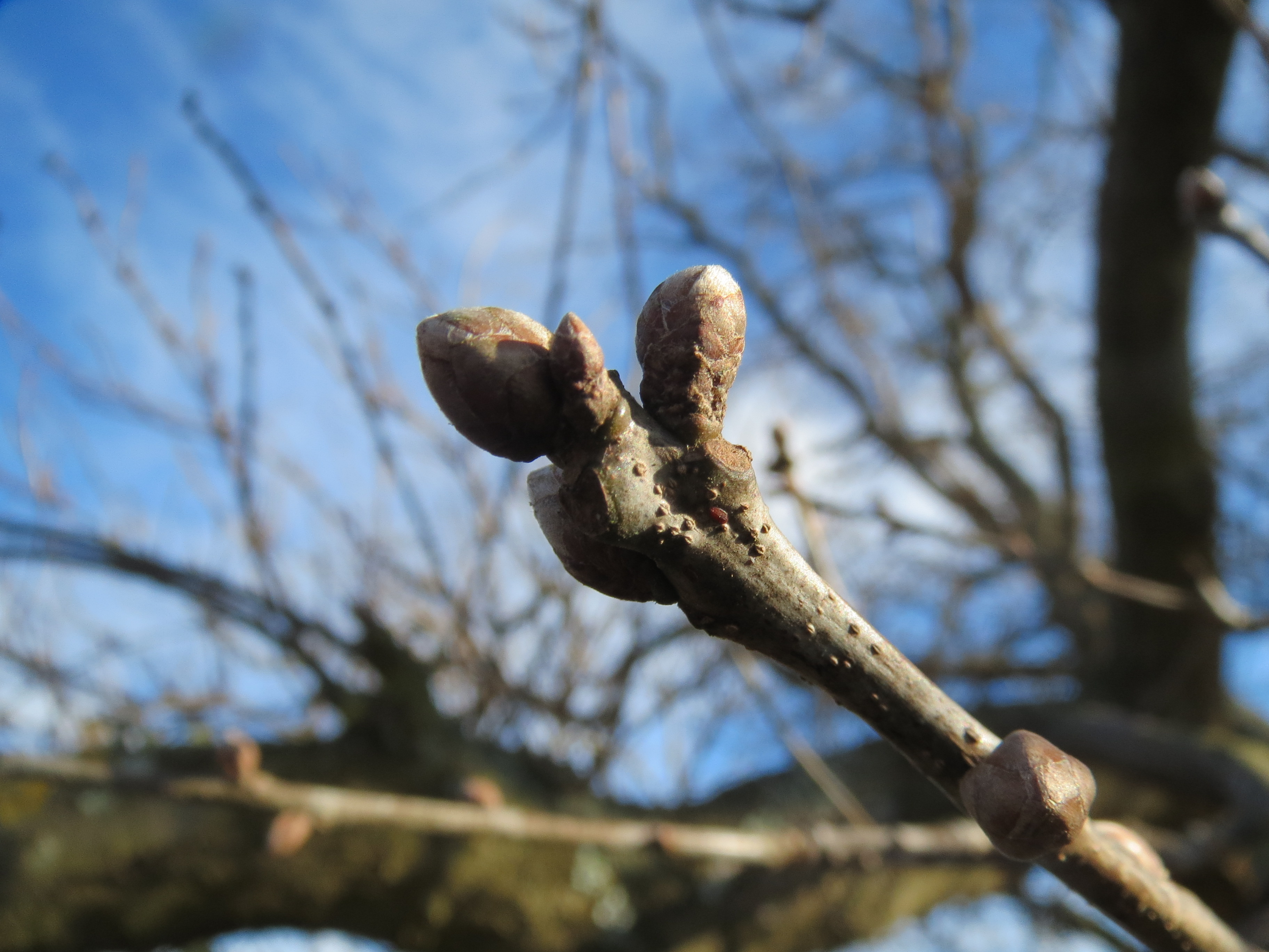 Eiche (Quercus robur) bei Hockenheim